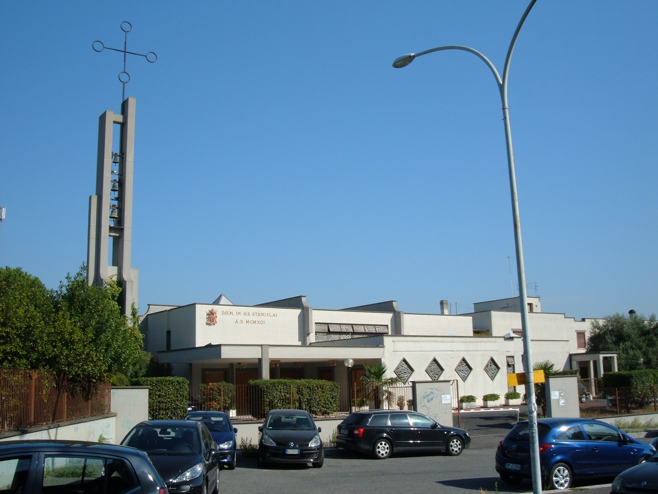 Chiesa di San Stanislao, a Roma, nel quartiere Don Bosco.